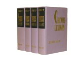 Roempp Lexikon, 6. Auflage